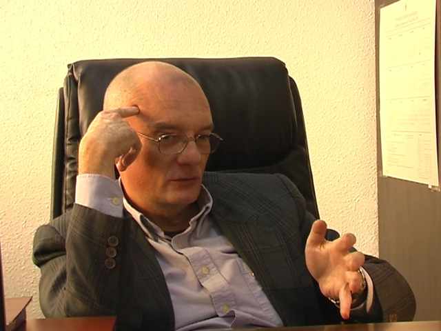 Jesús González Requena en su despacho de la UCM